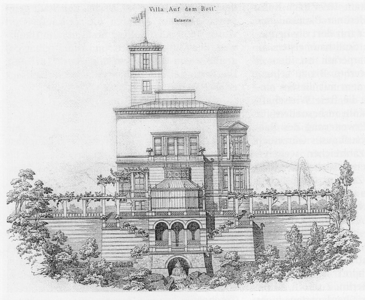 Haus Sölling in Rolandseck, Rheinfront/Ostseite nach Julius Carl Raschdorff)